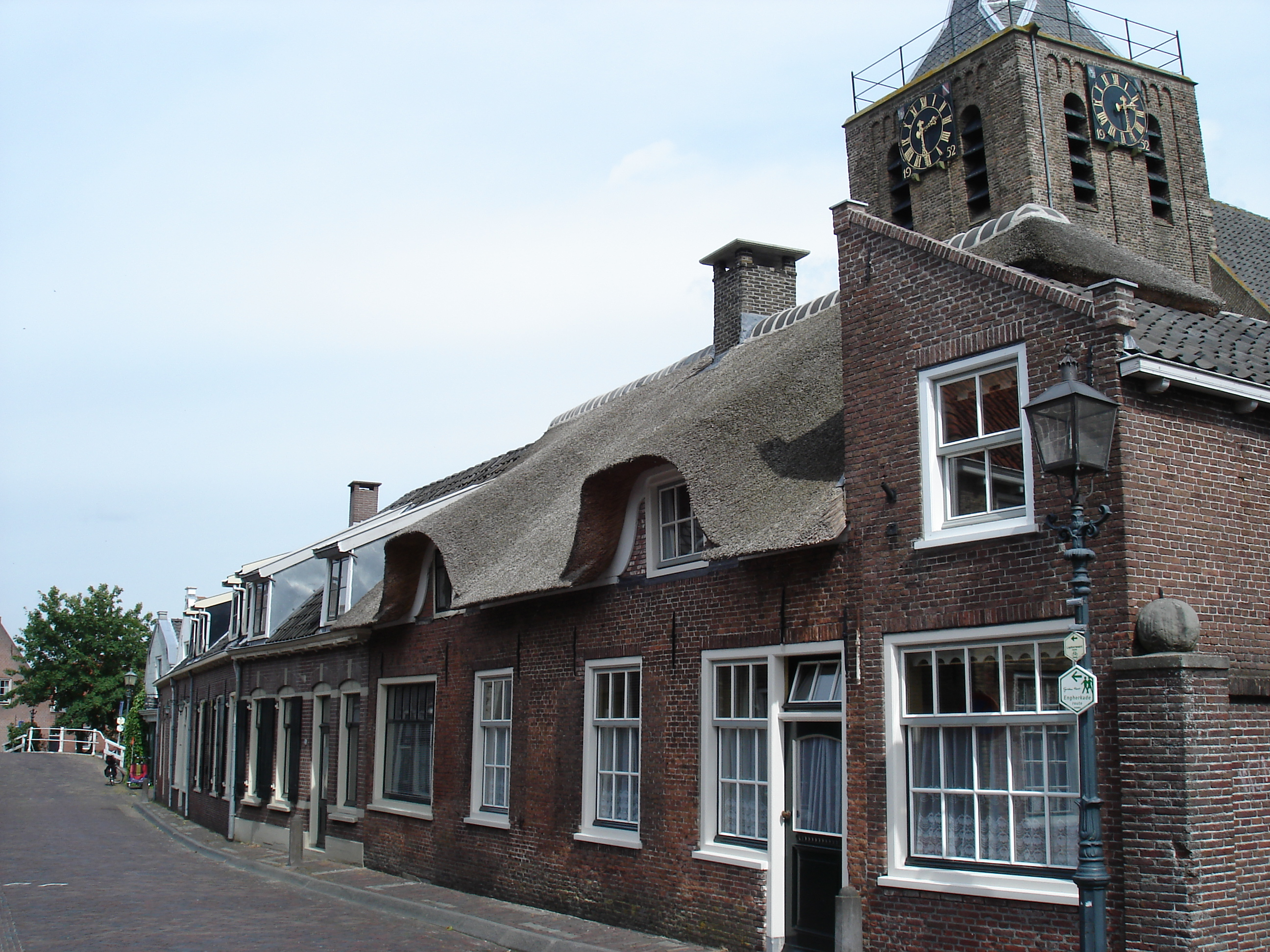 Linschoten, blik op de Dorpstraat.